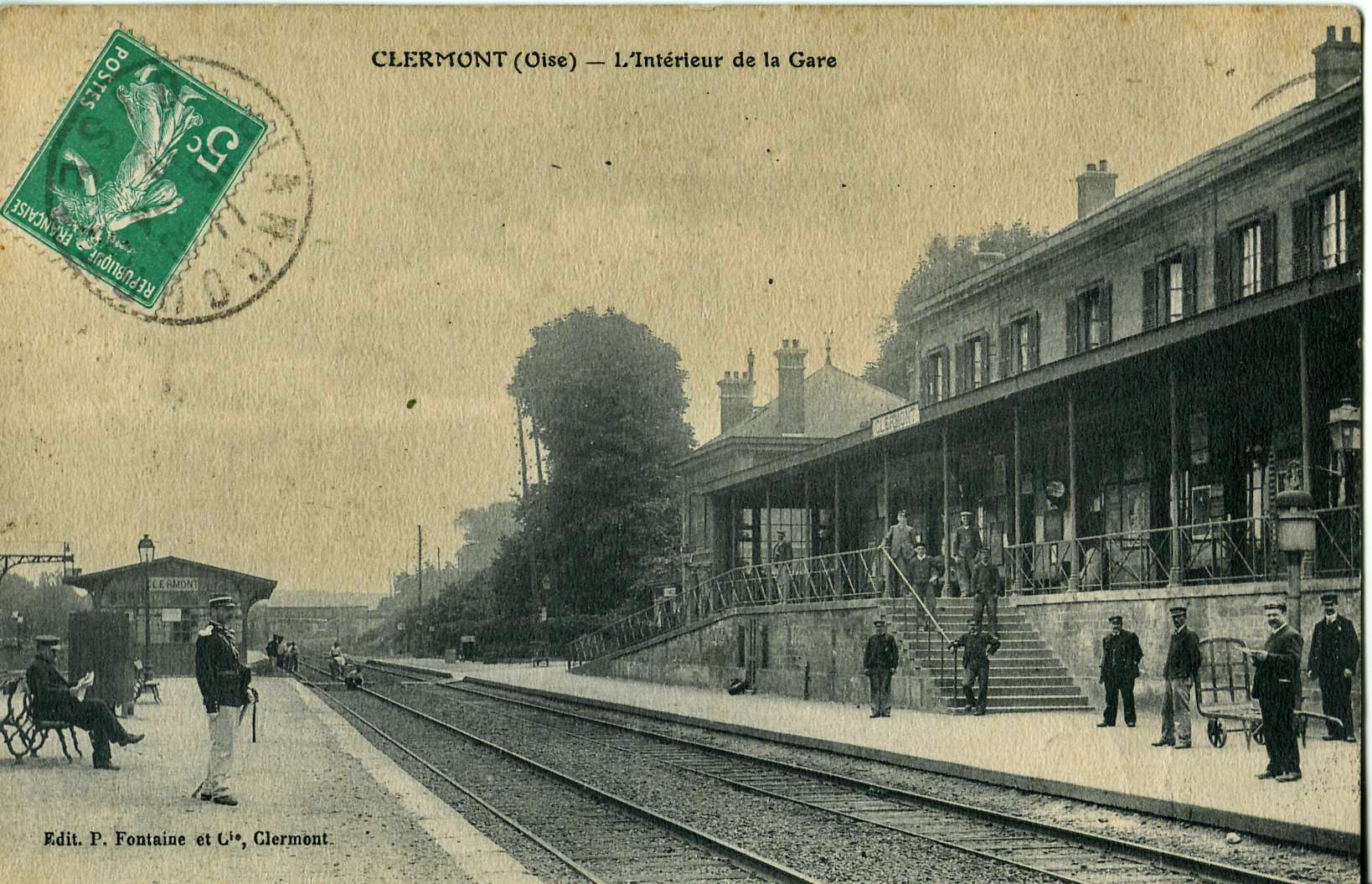 Carte postale ancienne éditée par Fontaine et Cie à Clermont : CLERMONT - L'intérieur de la Gare